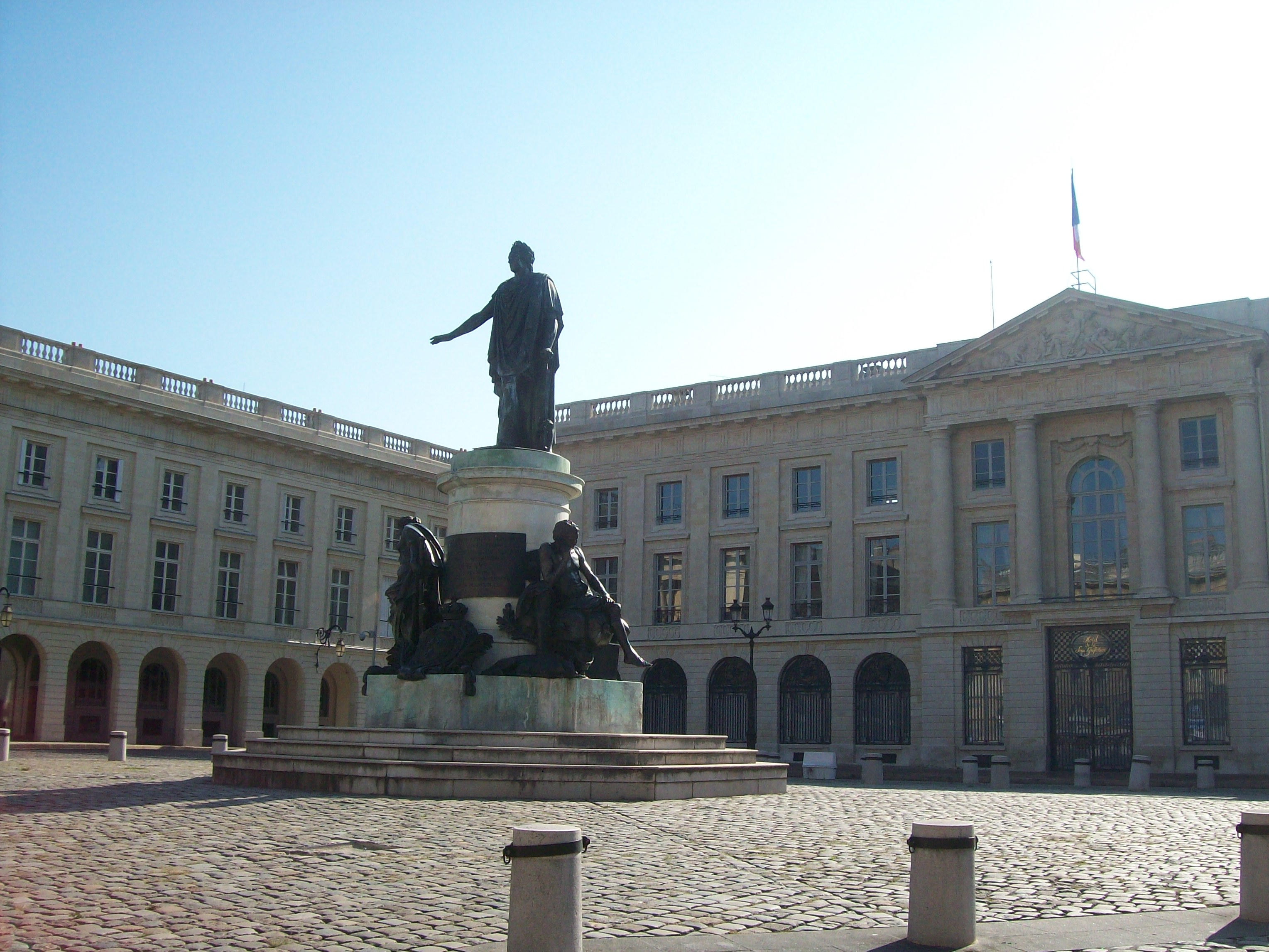 La Place Royale — Reims, Champagne-Ardenne, France